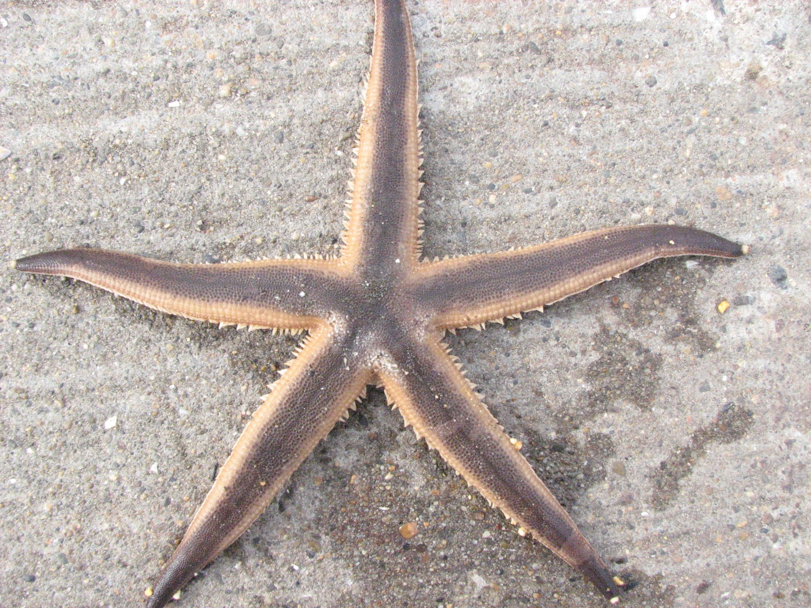 スナヒトデ(茨城県・鹿島港)(Luidia quinaria)